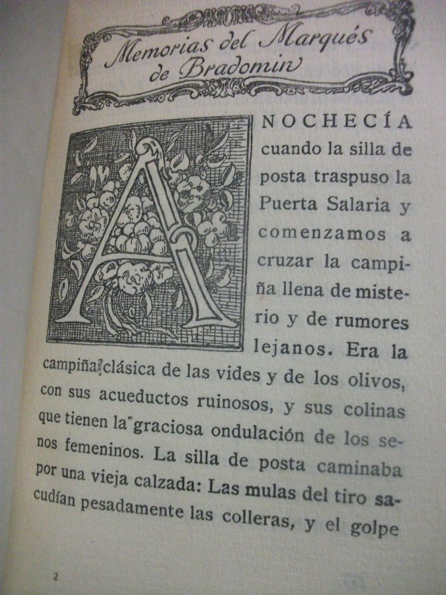 Primera página de la Sonata de primavera de Ramón del Valle-Inclán. Edición de 1922, por la Imprenta Helénica de Madrid.